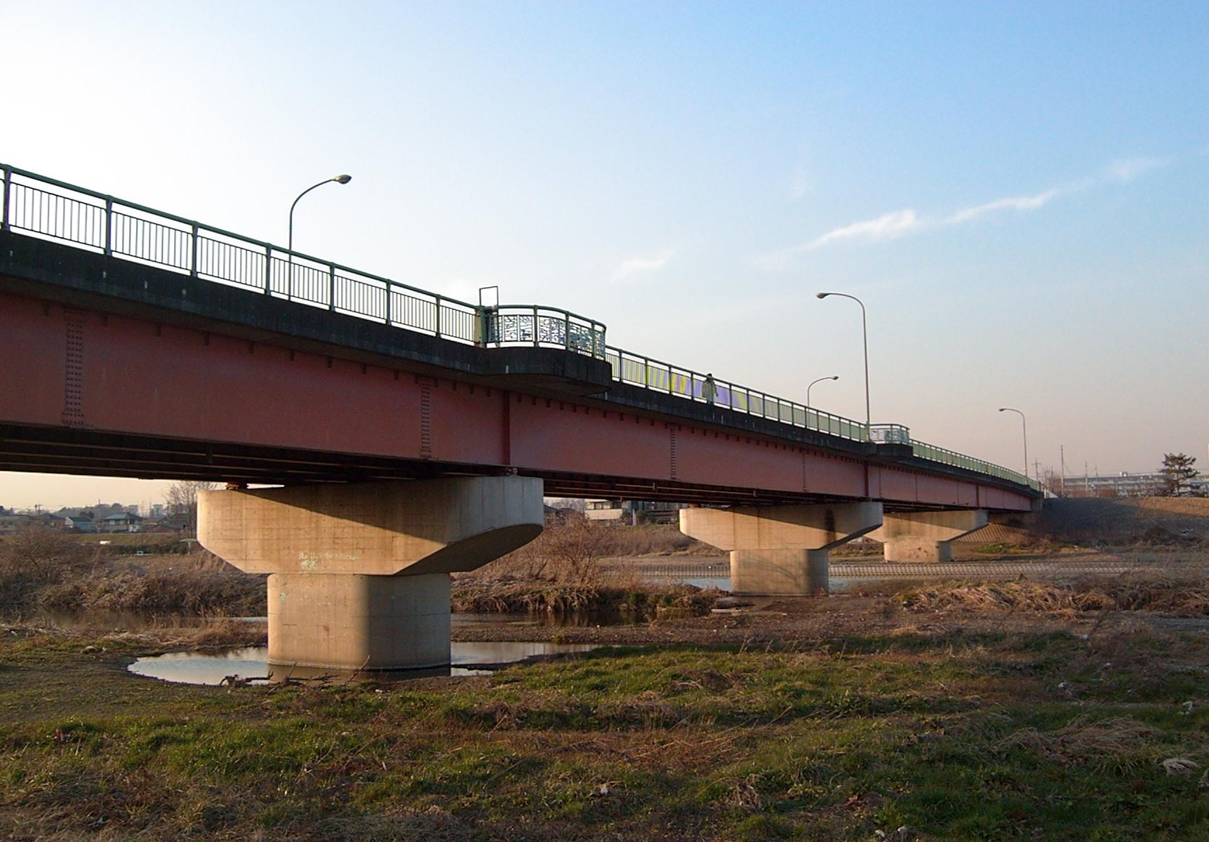 広瀬橋。埼玉県狭山市広瀬東2丁目。入間川に掛かる狭山市道幹73号線の橋。右岸から北西の方向を見る。地図はこちら。